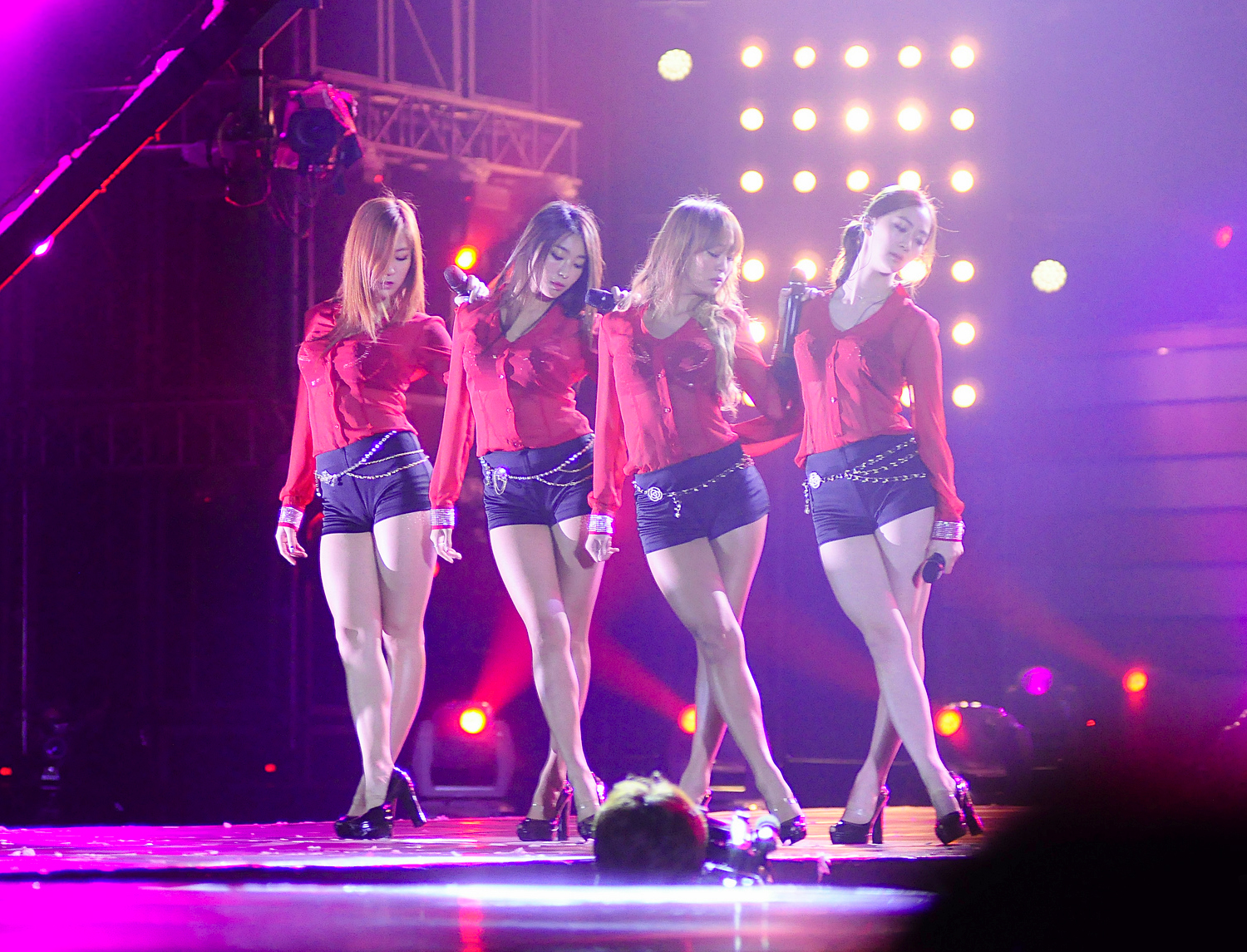 Sistar at Kpop festival in Vietnam